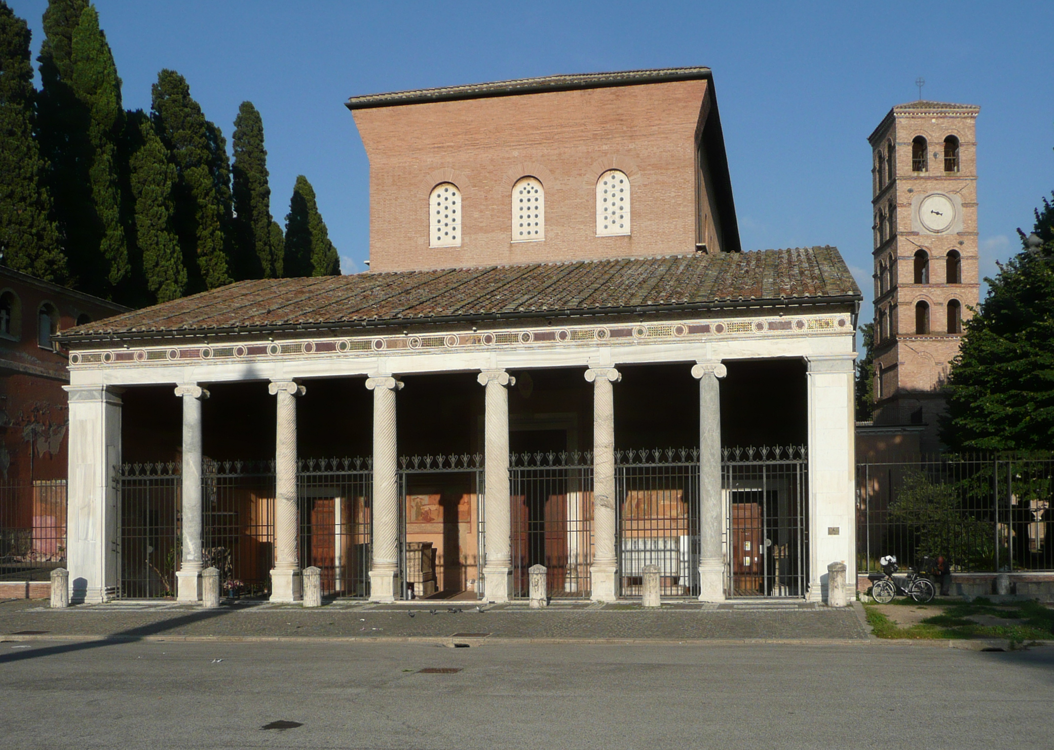 S. Lorenzo fuori le mura in Rom, Bau des 6. und des 13. Jahrhunderts; Portikus des 13. Jahrhunderts